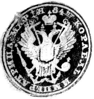 Оттиск печати линейного корабля Императрица Мария